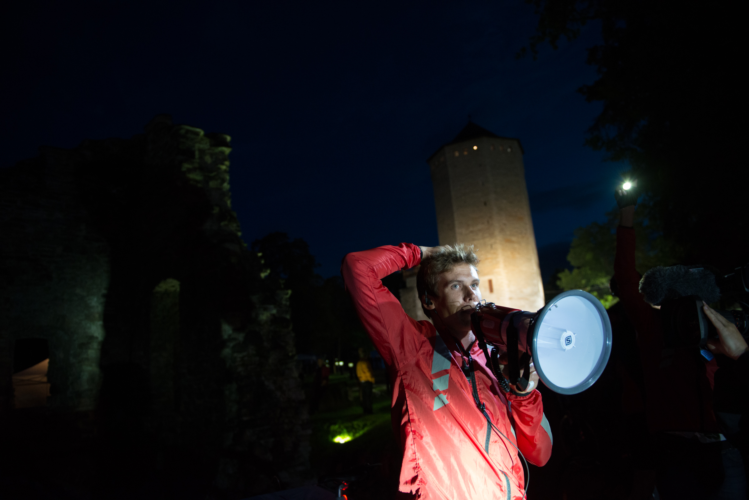 Rasmus Kaljujärv